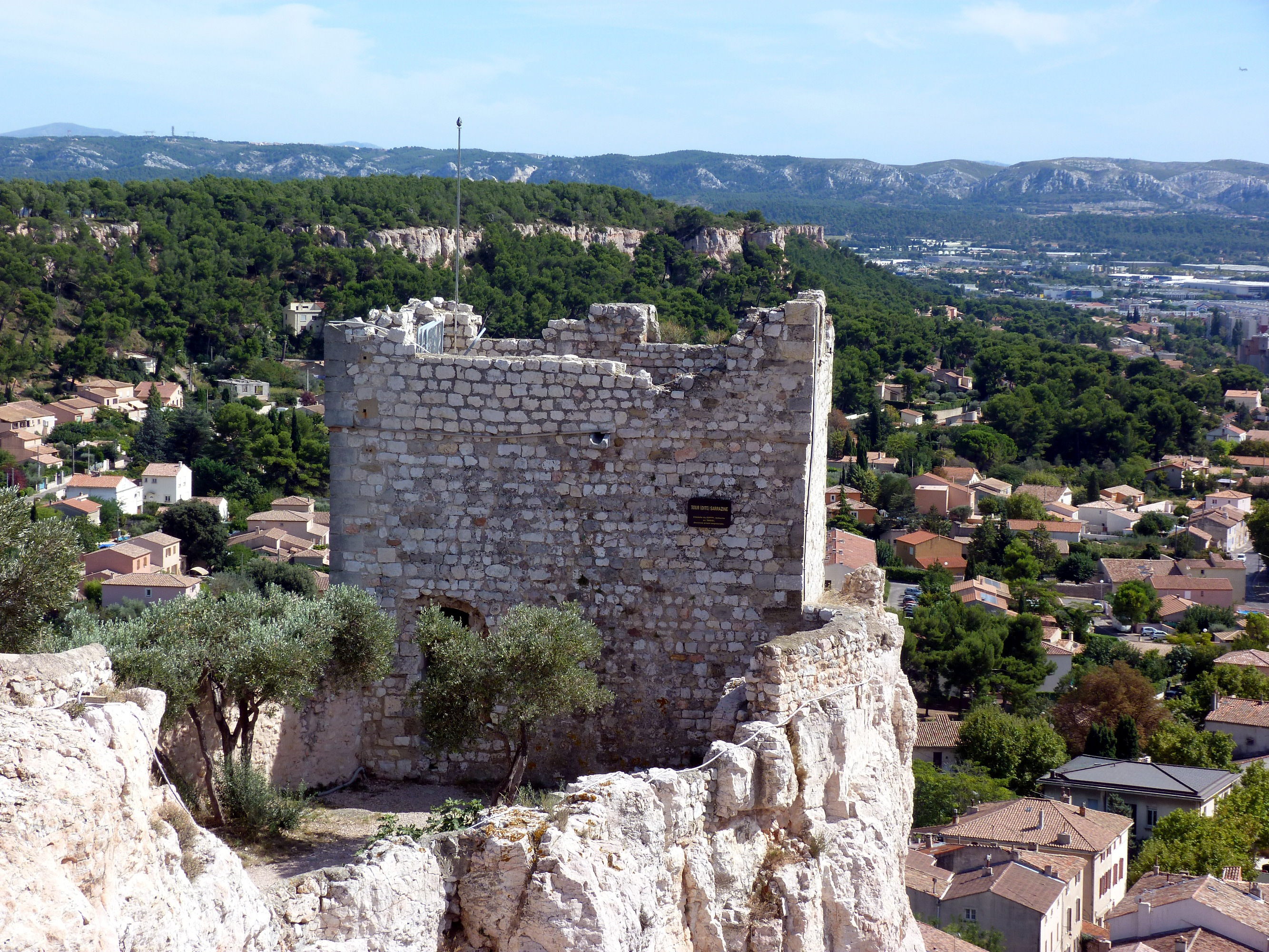 La tour dite "Sarrazine" en haut du Rocher de Vitrolles (Bouches-du-Rhône, France).